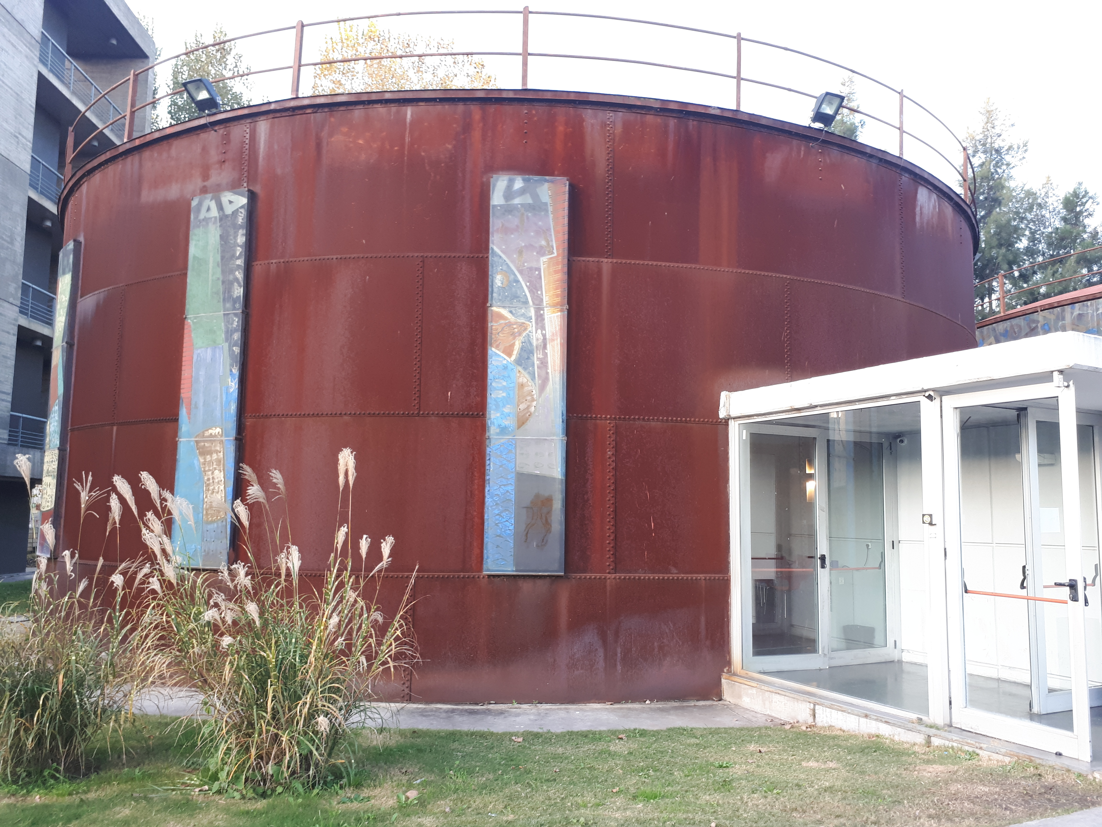 Auditorio reformando uno de los tanques del predio ferroviario en donde actualmente funciona el Campus Miguelete de la Universidad Nacional de San Martín.